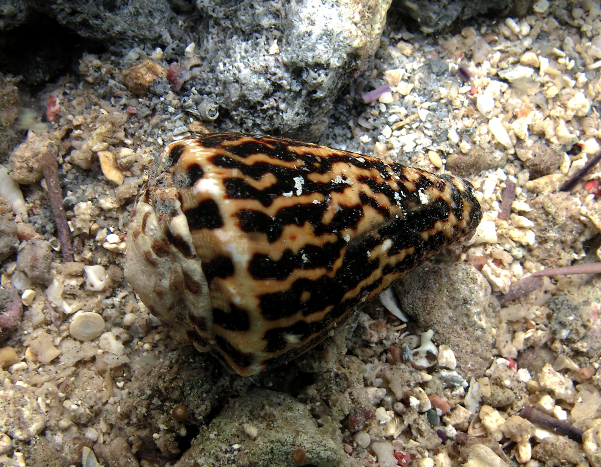 Le cône venimeux Conus chaldaeus à la Réunion.